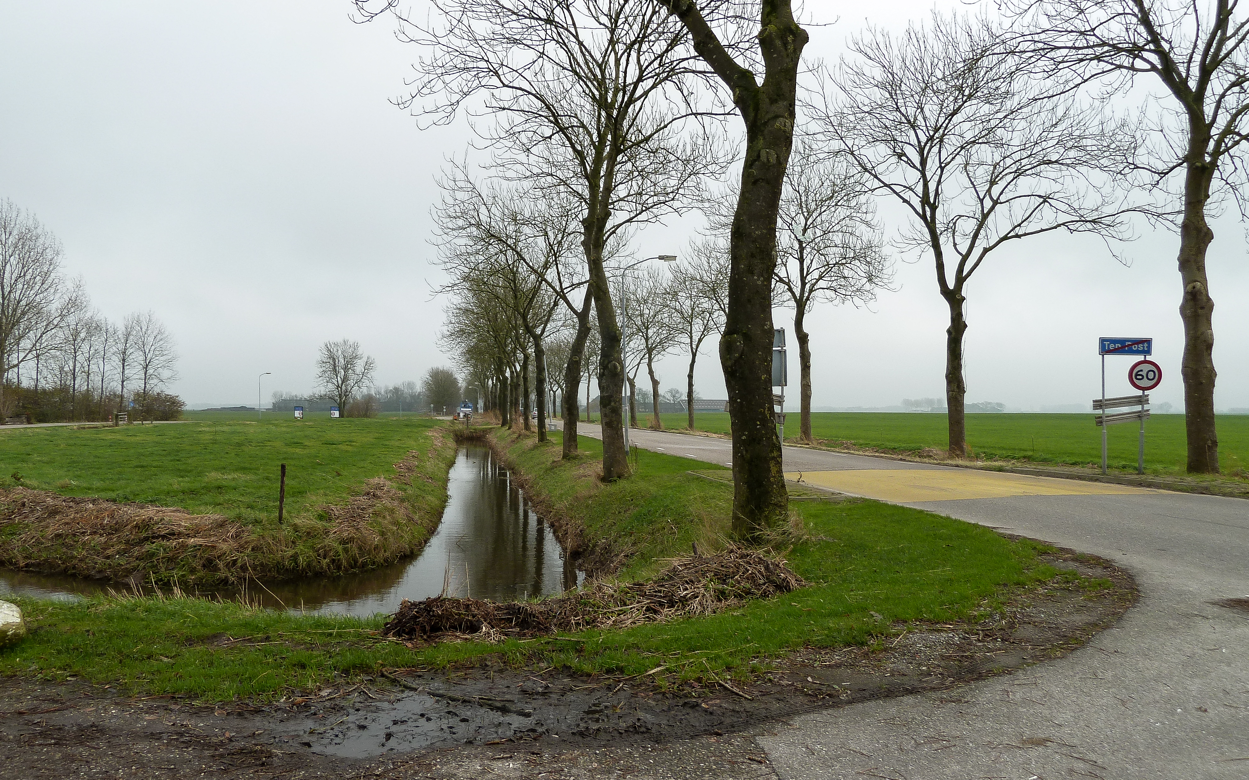 Voormalig borgterrein van Tuwinga bij Ten Post